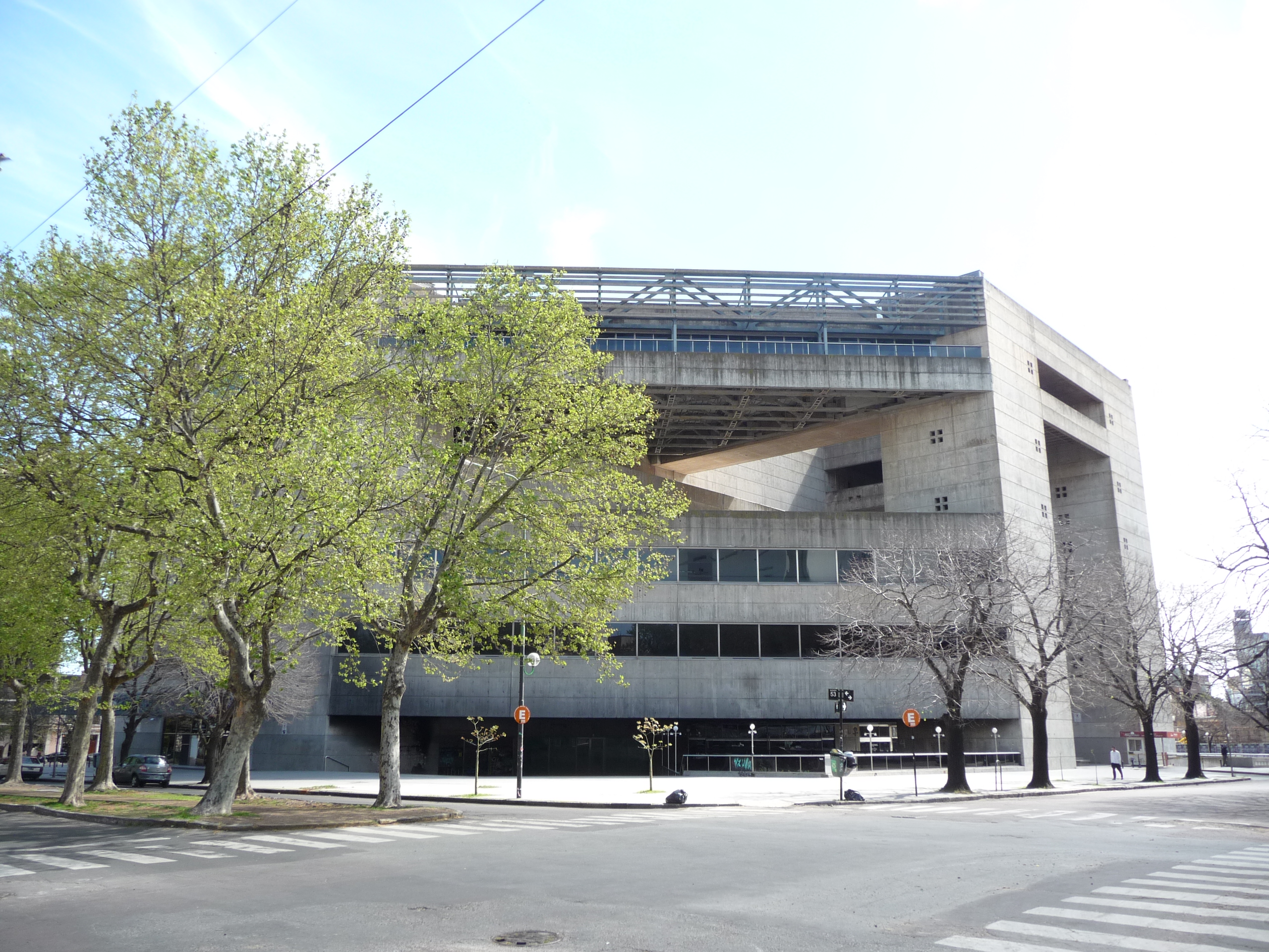 Complejo cultural Teatro Argentino La Plata visto desde calles 9 y 53